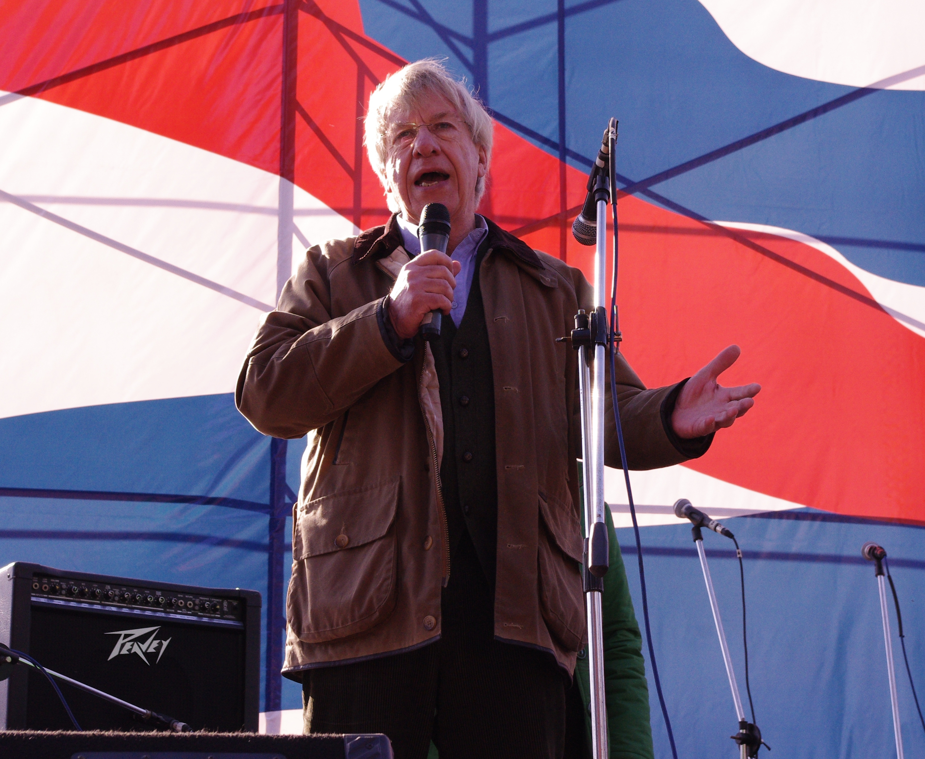 Palabras de saludo del político de Uruguay, Danilo Astori en un acto político del Movimiento de Participación Popular (MPP) el sábado 10 de setiembre de 2011.